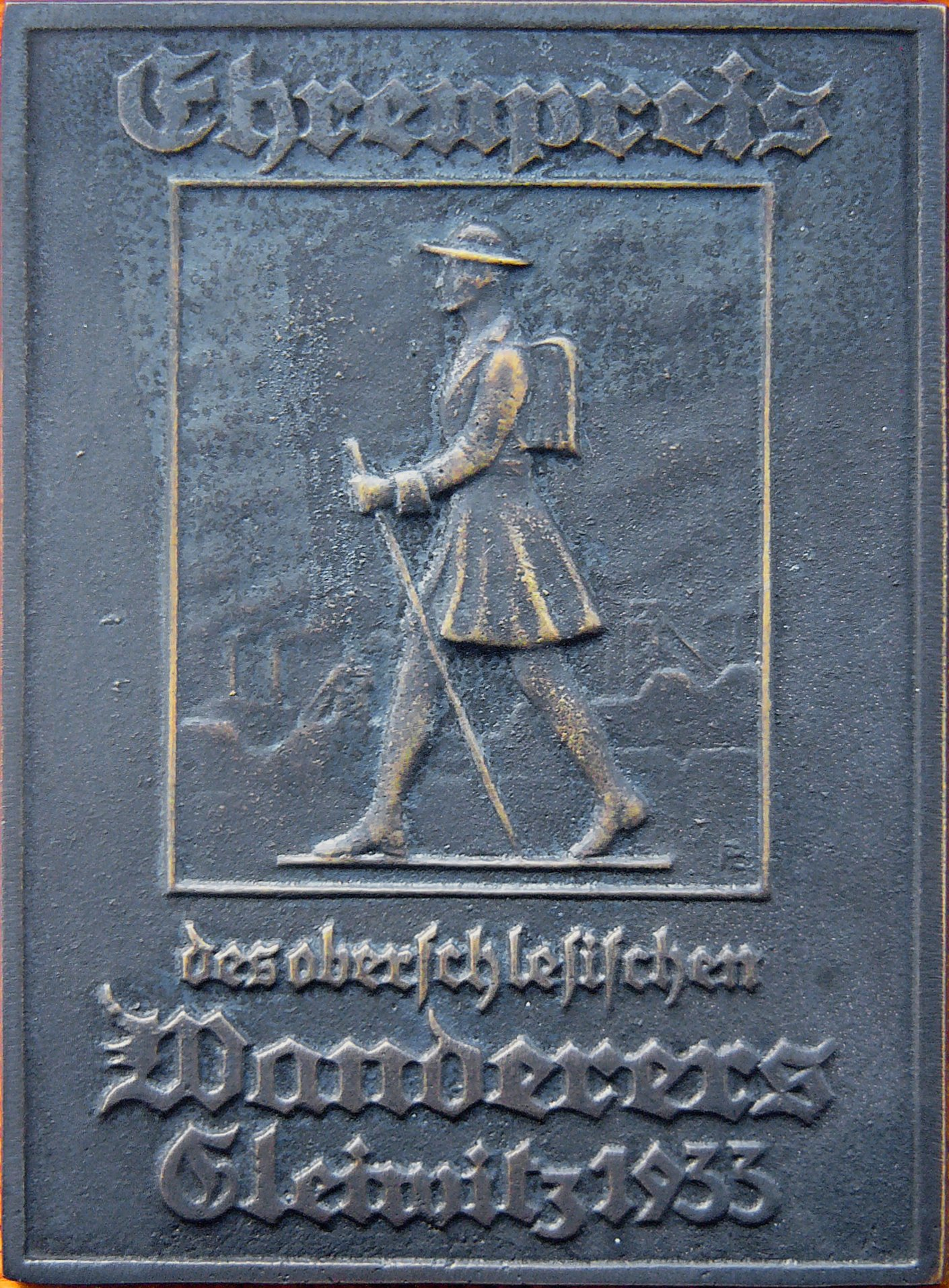 Ehrenpreis-Plakette des Oberschlesischen Wanderers von 1933. Gegossen in der Königlich Preußischen Eisengießerei in Gleiwitz.